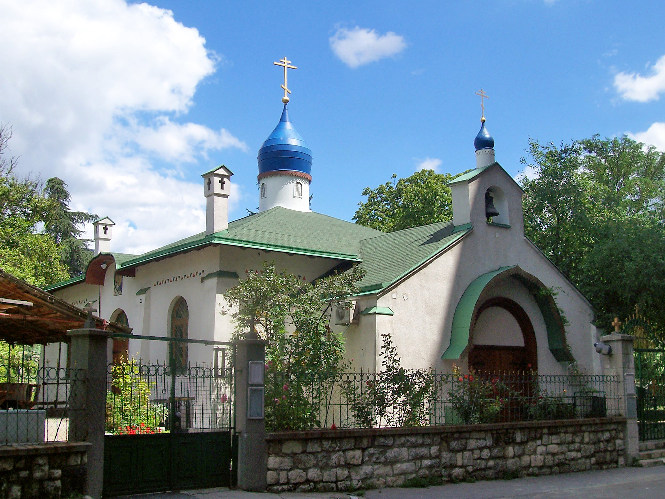 Храм Святой Троицы в Белграде (Сербия)